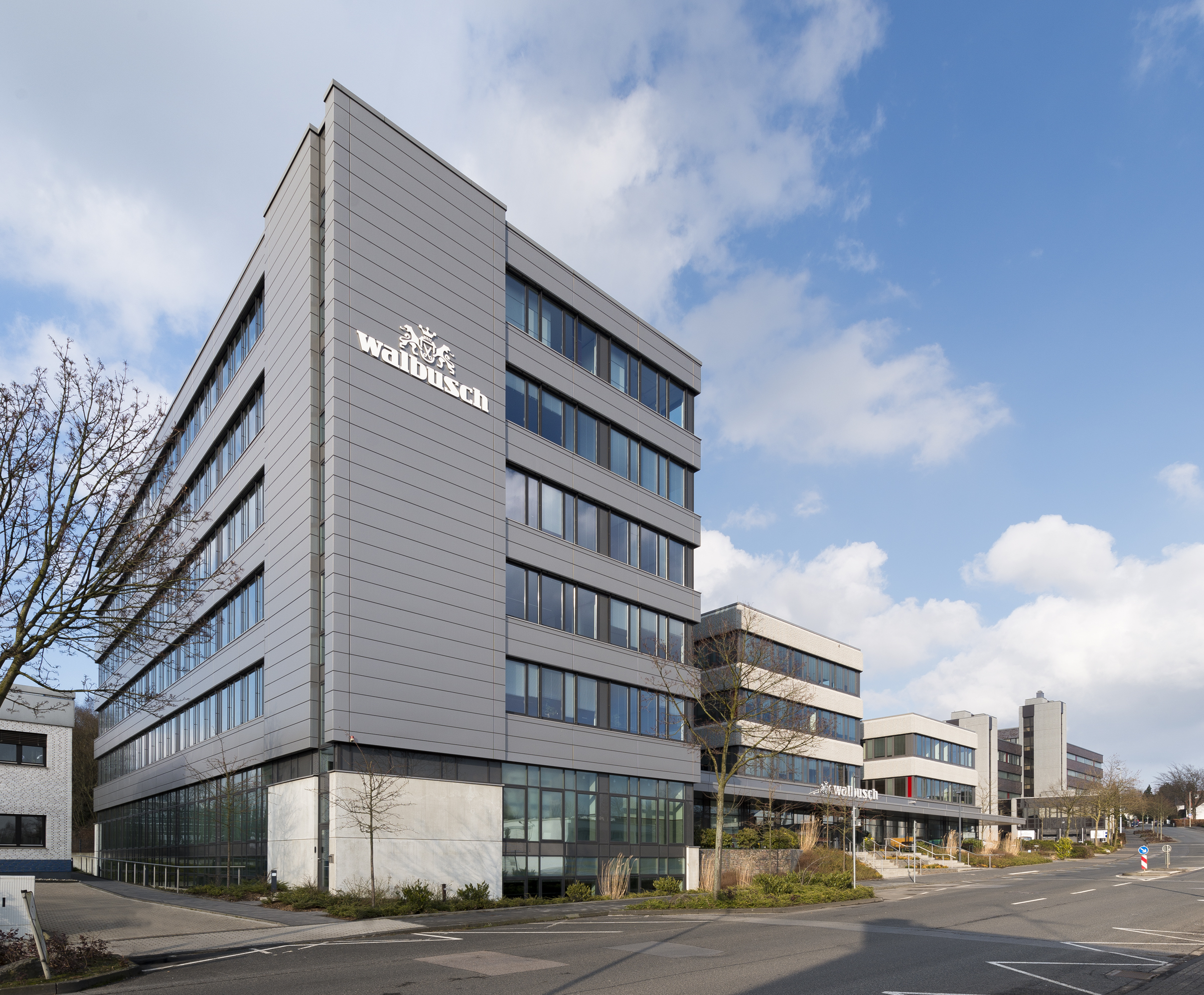 Sitz der Firma Walbusch in Solingen